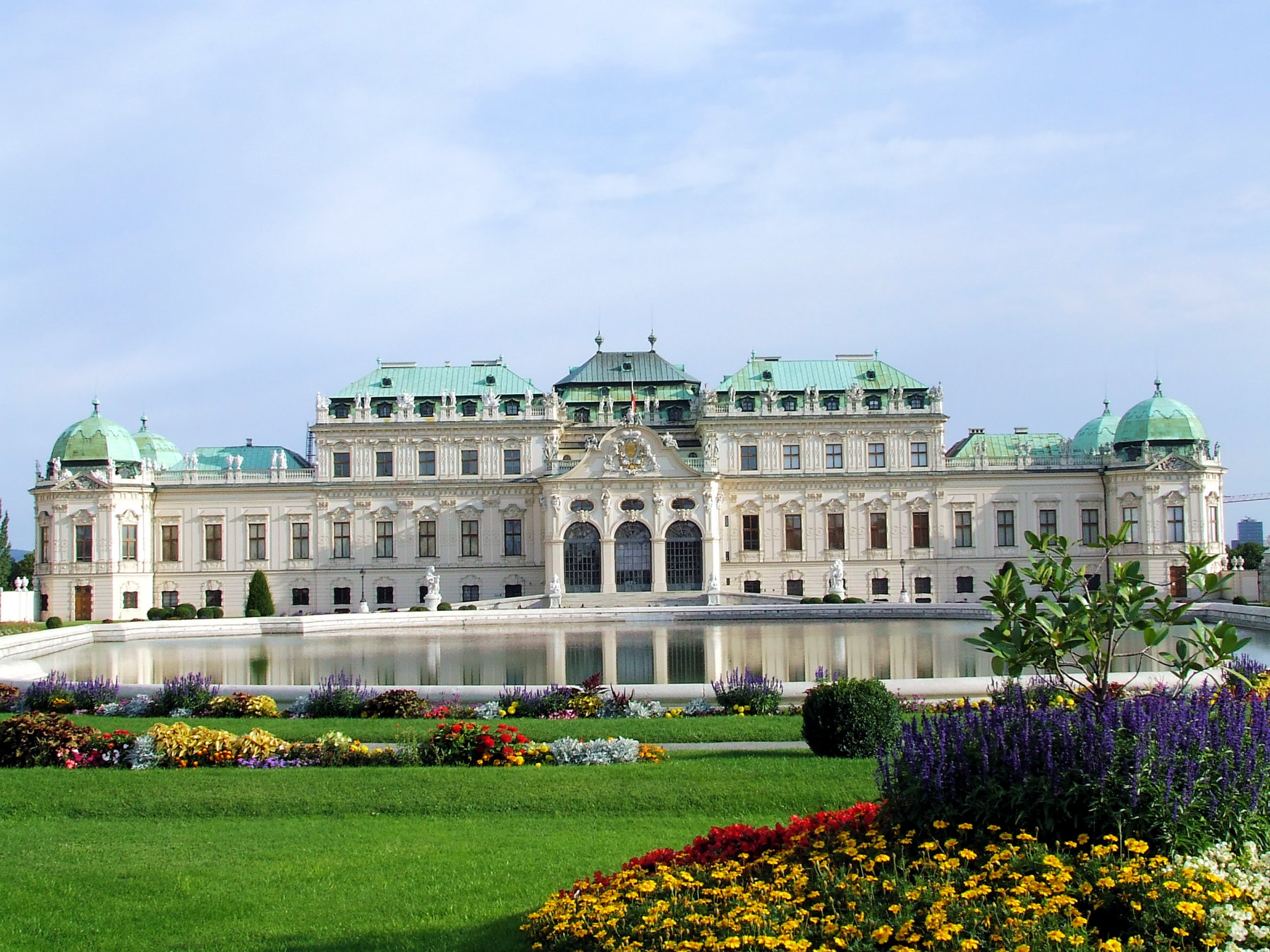 Schloss Belvedere in Wien.